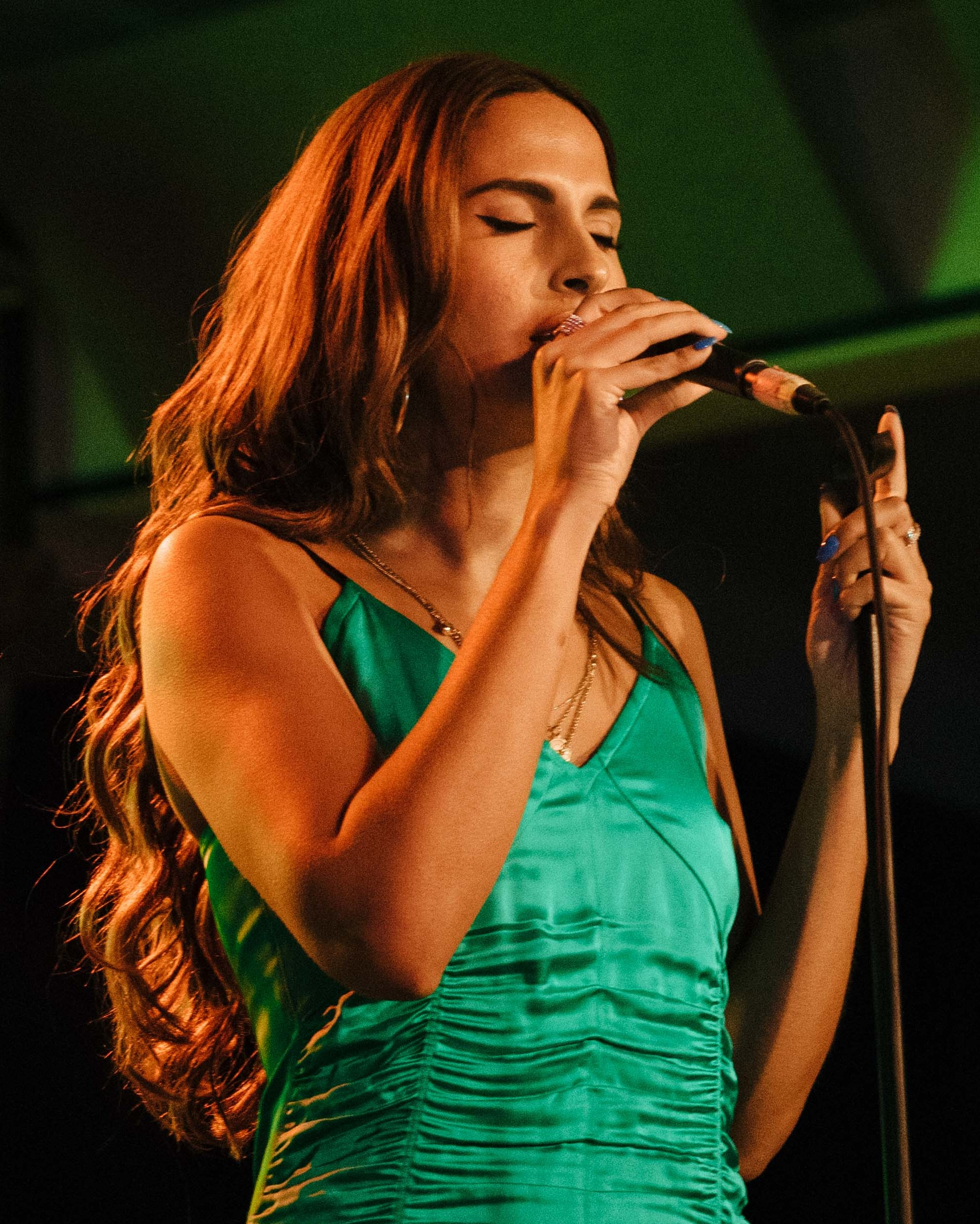 Snoh Aalegra at Sonia